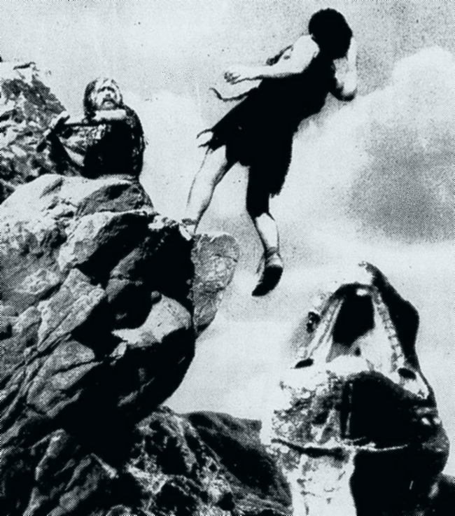 Cena do filme One Million B. C. (1940)